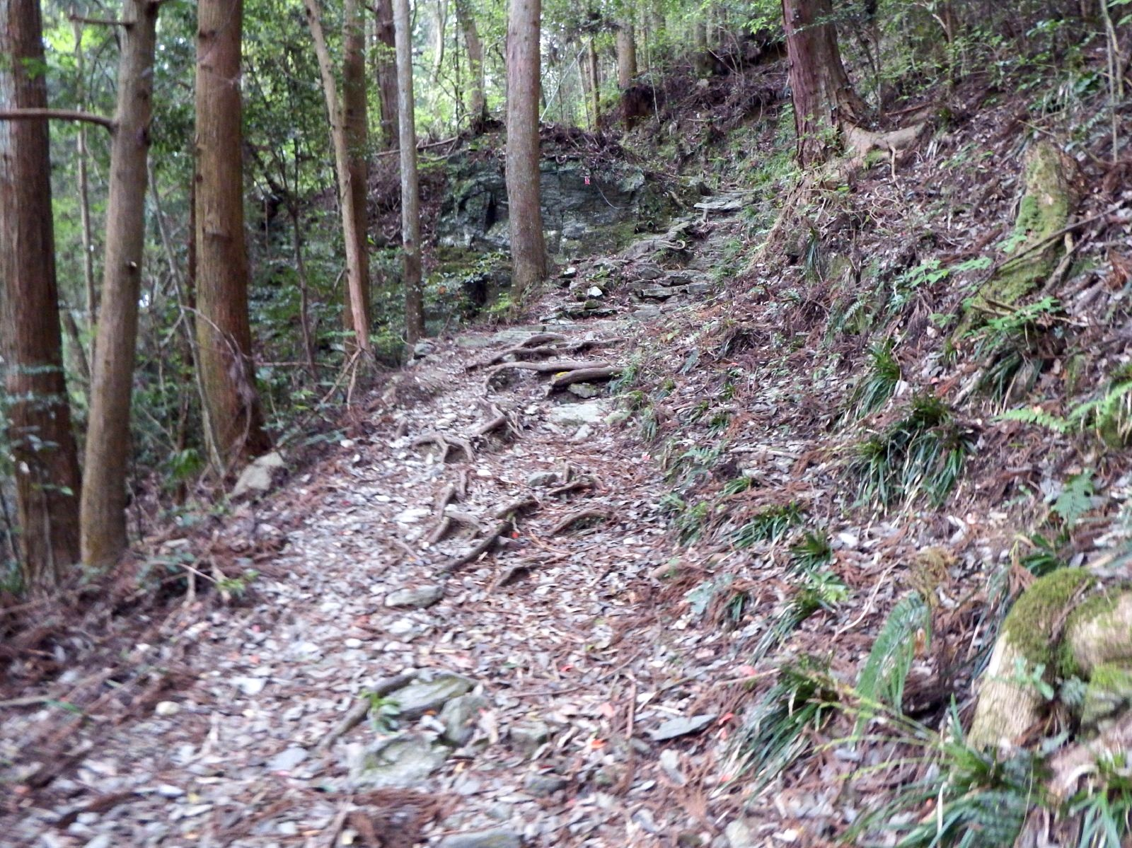 阿波遍路道 焼山寺道